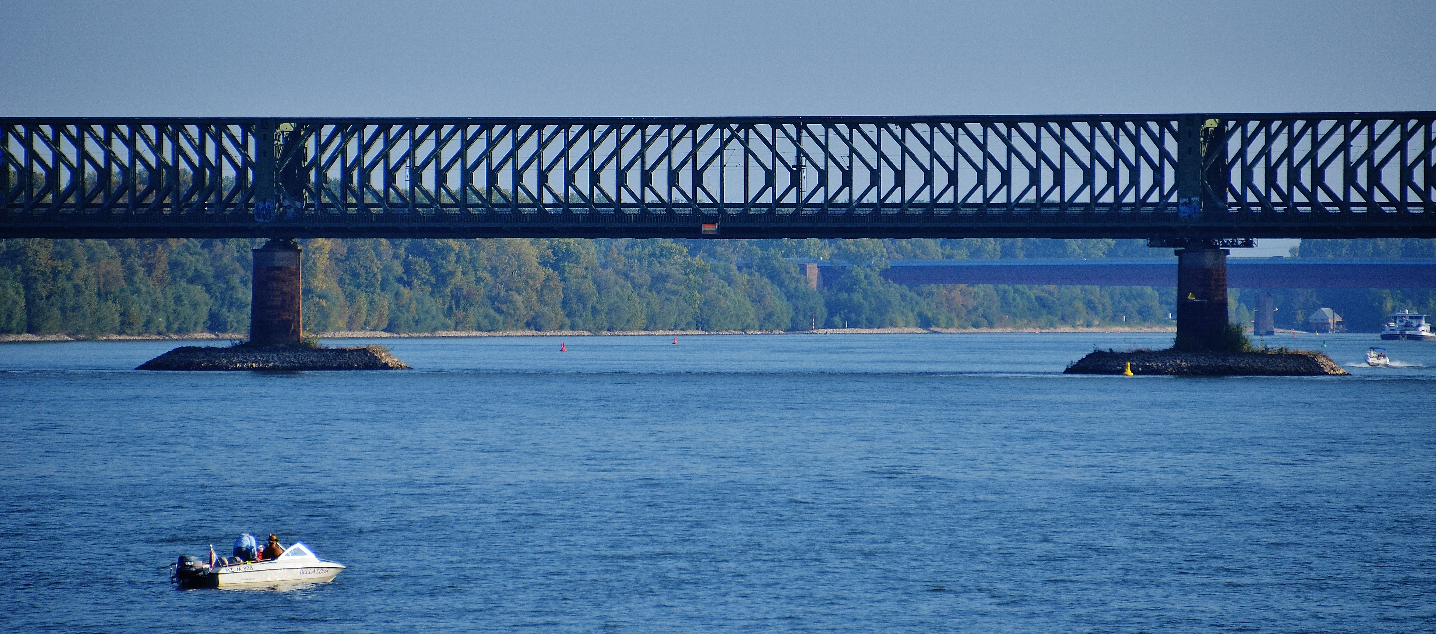 Eisenbahnbrücke über den Rhein